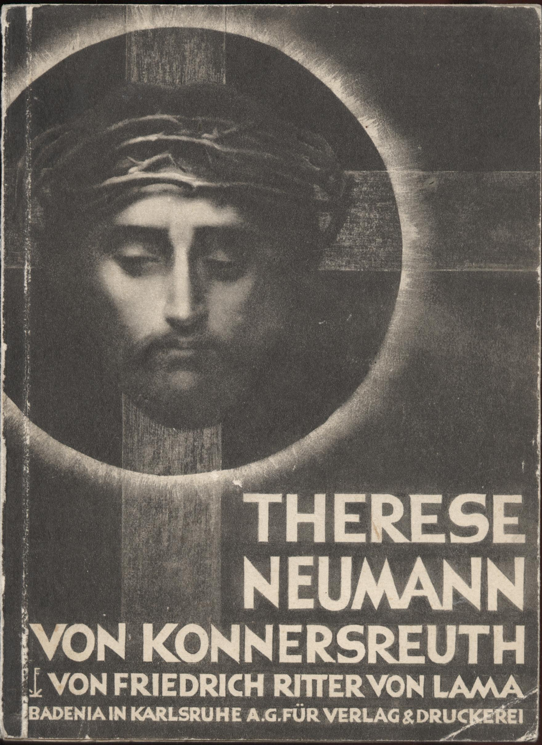 Ritter von Lama, Buchcover